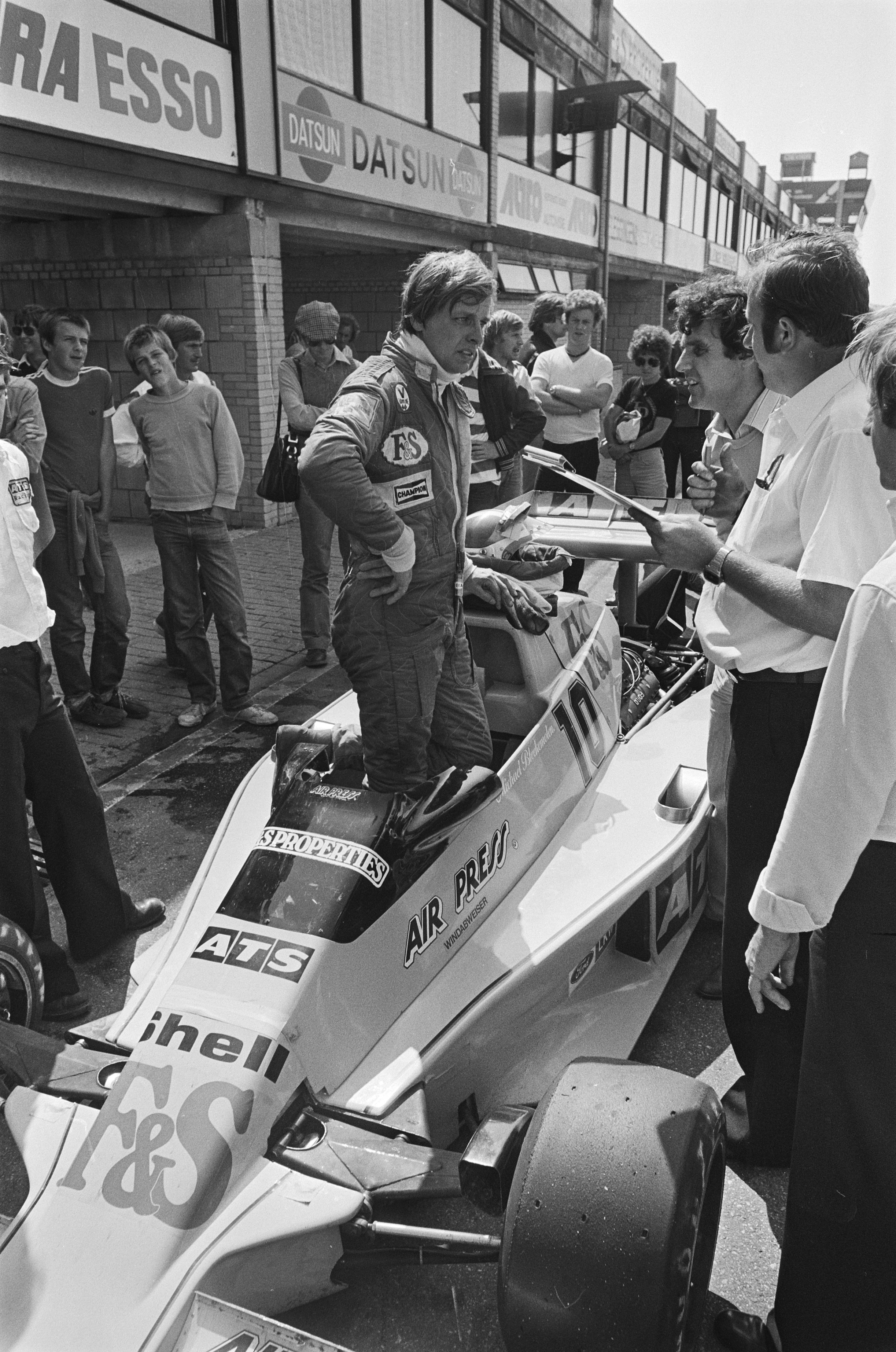 Collectie / Archief : Fotocollectie Anefo Reportage / Serie : [ onbekend ] Beschrijving : Michael Bleekemolen test ATS-wagen voor Grand Prix op Zandvoort Datum : 15 augustus 1978 Locatie : Noord-Holland, Zandvoort Trefwoorden : raceauto's, testen Fotograaf : Verhoeff, Bert / Anefo Auteursrechthebbende : Nationaal Archief Materiaalsoort : Negatief (zwart/wit) Nummer archiefinventaris : bekijk toegang 2.24.01.05 Bestanddeelnummer : 929-8576